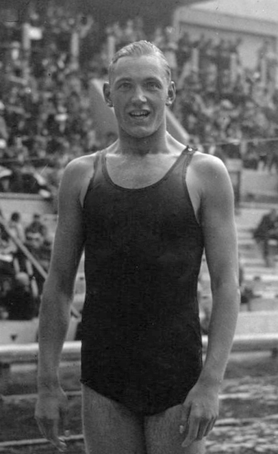 Les Tourelles : Championnats d'Europe : Wittenberg (allemand) : [photographie de presse] / Agence Meurisse